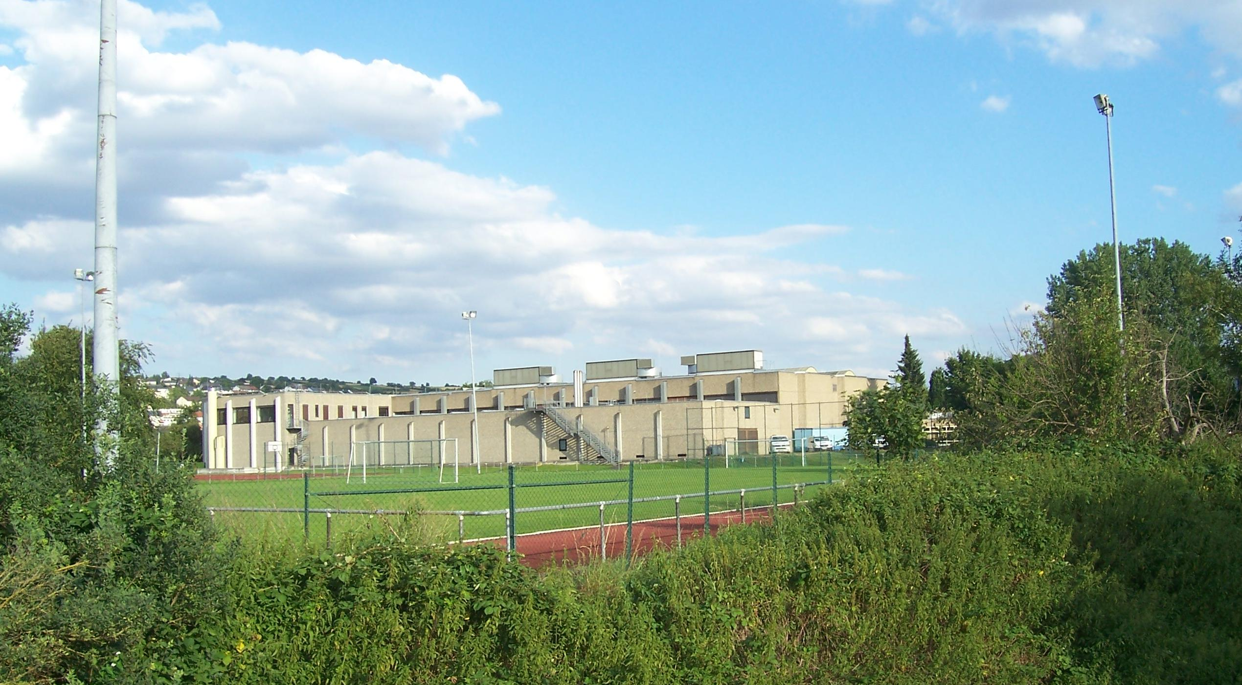 Sporthalle und Sportplatz des Olympiastützpunktes Tauberbischofsheim